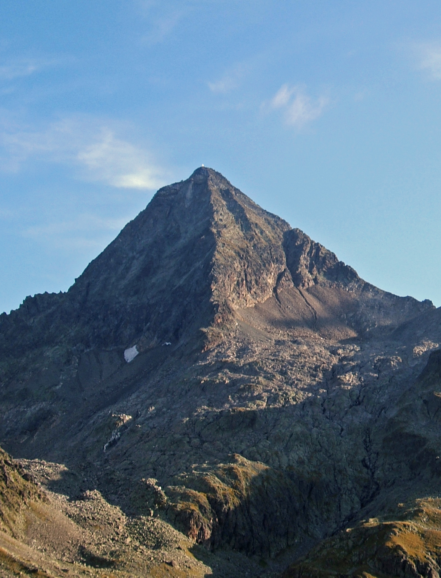 Glödis von Süden